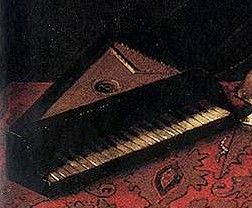 detail